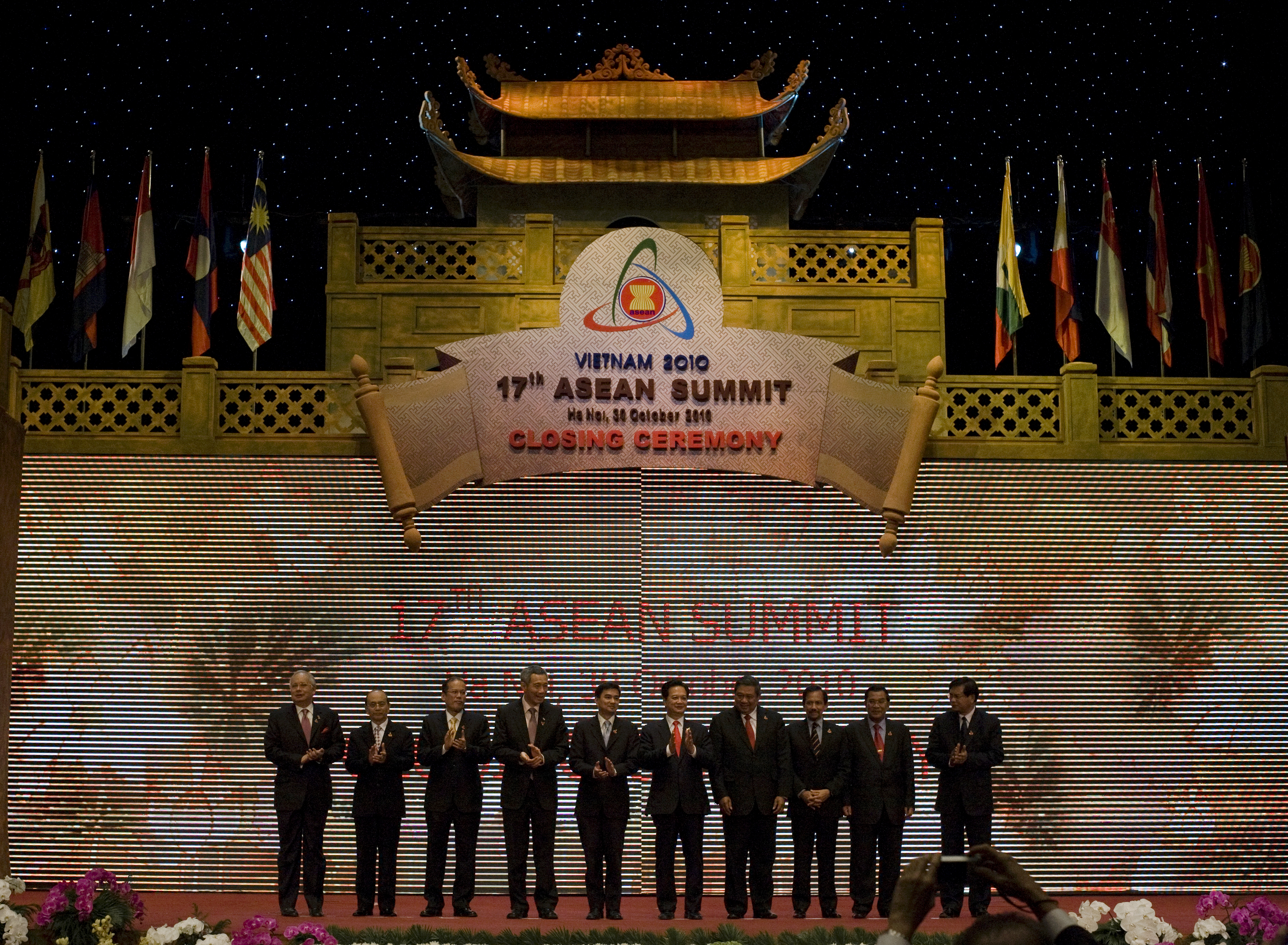 ผศ.ดร. พิมพ์เพ็ญ เวชชาชีวะ ภริยานายกรัฐมนตรี ร่วมพิธีปิดการประชุมสุดยอดอาเซียนครั้งที่ 17 พร้อมนายกรัฐมนตรี ณ Main Meeting Hall, NCC กรุงฮานอย สาธารณรัฐสังคมนิยมเวียดนาม วันเสาร์ที่ 30 ตุลาคม พ.ศ.2553 (Photographer attached to the Prime Minister of the Kingdom of Thailand : Peerapat Wimolrungkarat / พีรพัฒน์ วิมลรังครัตน์) @is50mm